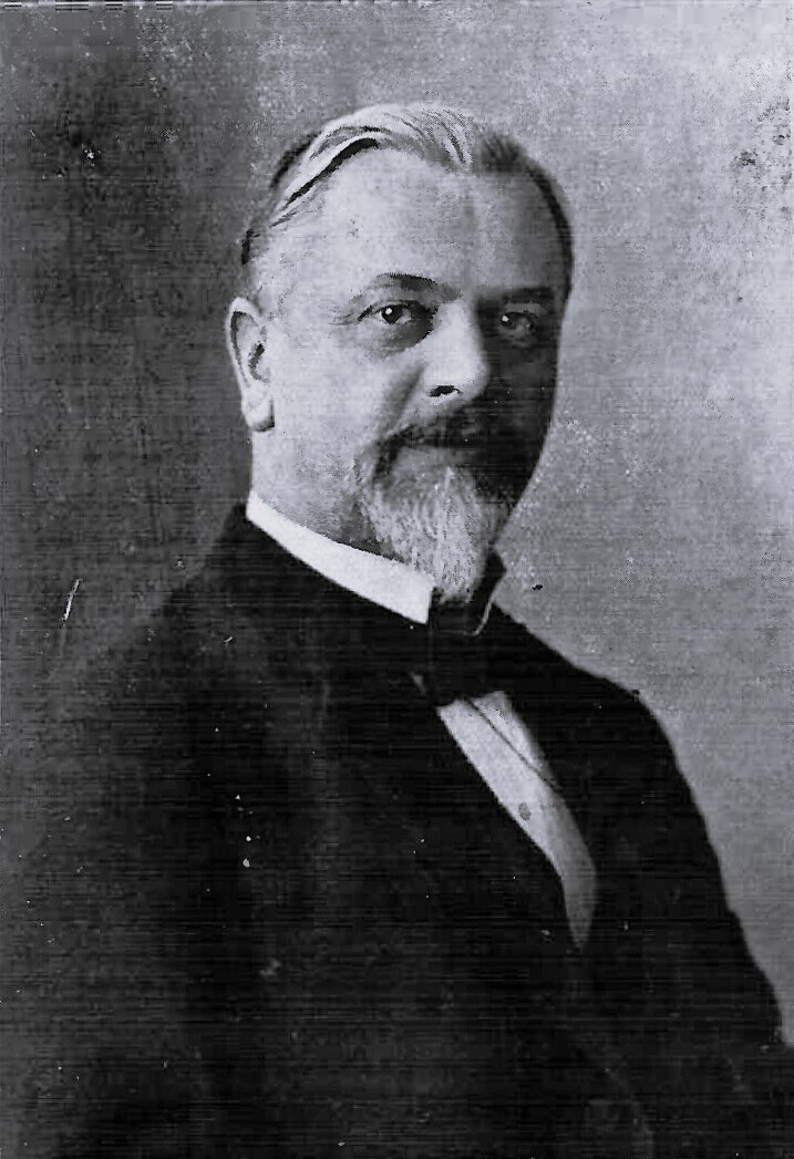 Mittelschulrektor Hermann Gottschalk.